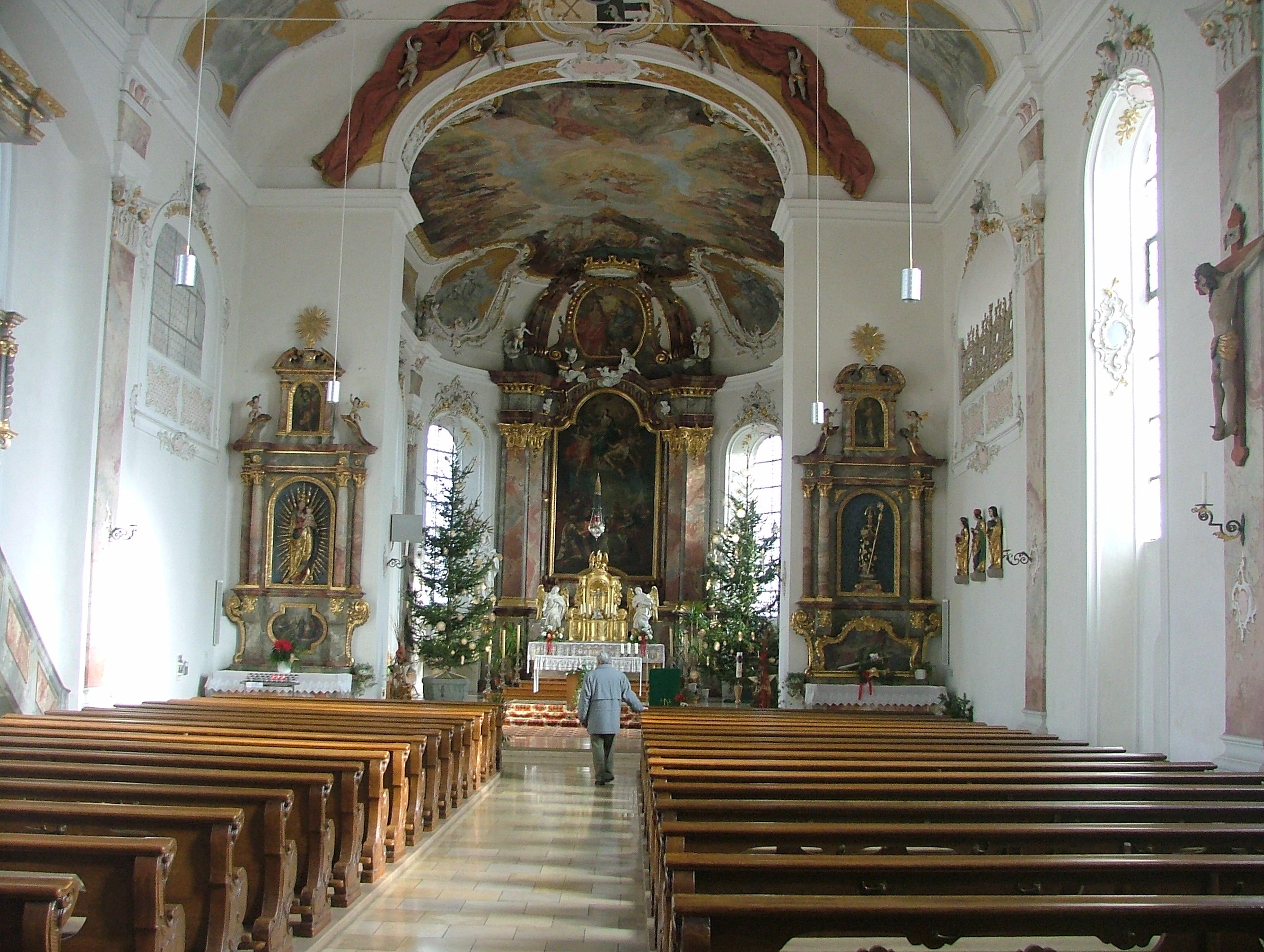 Waltenhofen